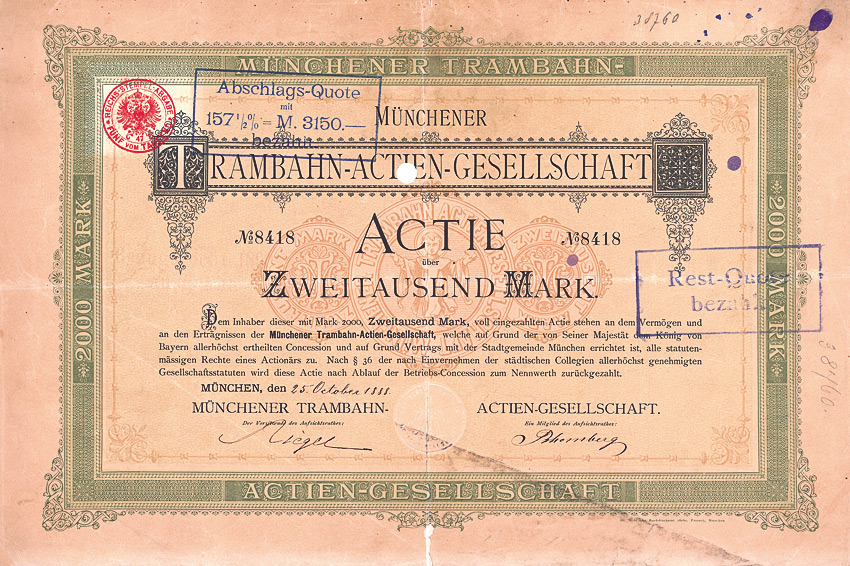 Aktie zu 200o Reichsmark der Münchner Trambahn-Aktiengesellschaft